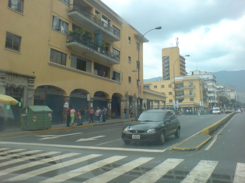 Avenida Baralt, Caracas, Venezuela